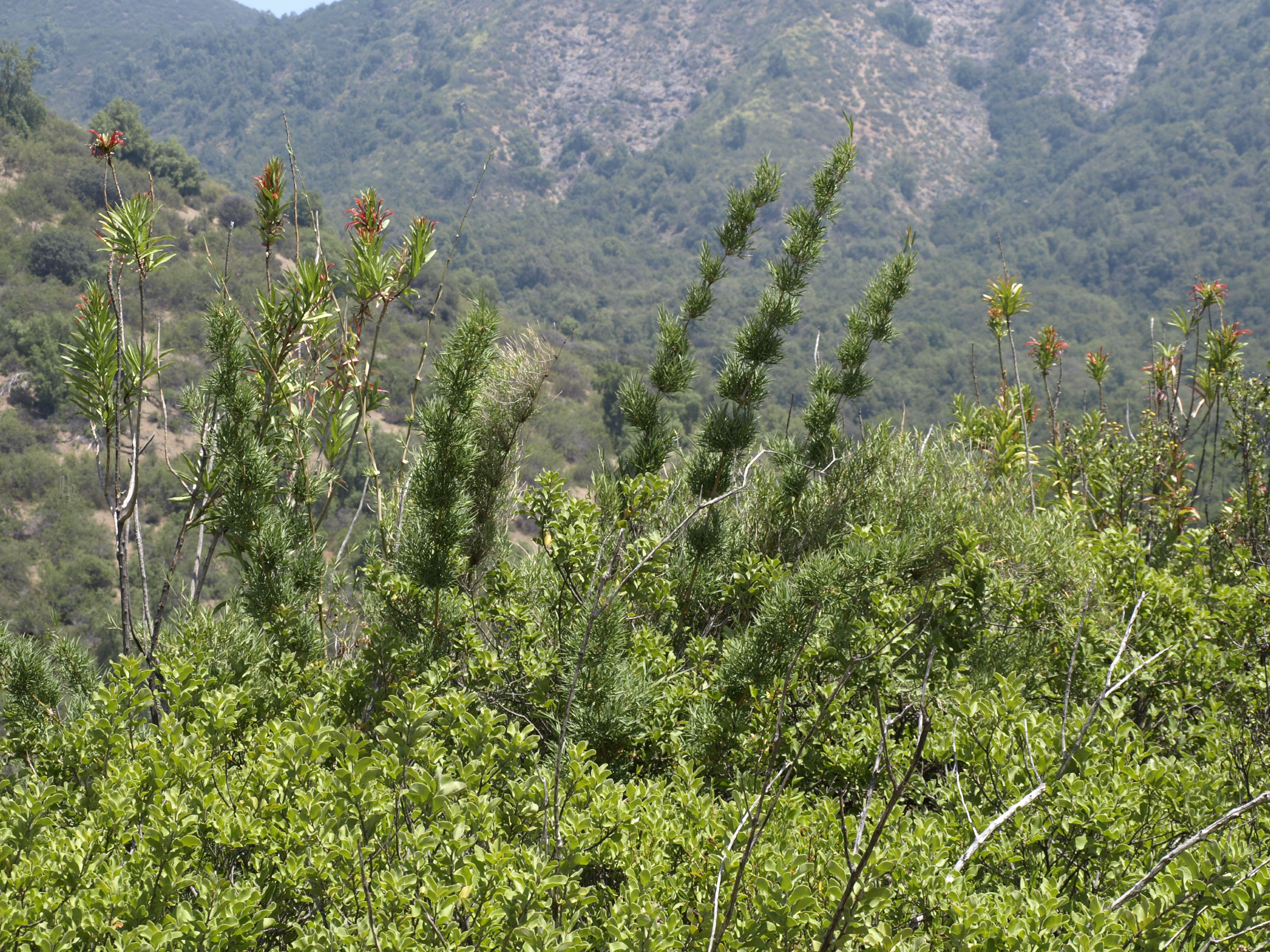 Chusquea cumingii en el Parque Nacional La Campana, Chile.